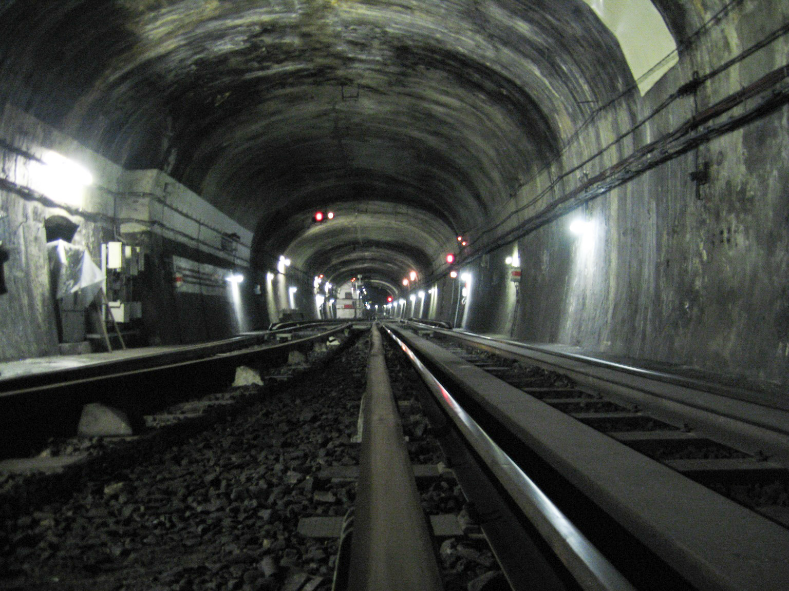 Journées du patrimoine RATP 16-17/09/2006. Gare du Nord USFRT vers la fausse Gare de l'Est d'instruction depuis l'intersection avec la voie de la fosse. (voir plan Image:Gare du Nord USFRT 1.jpg)